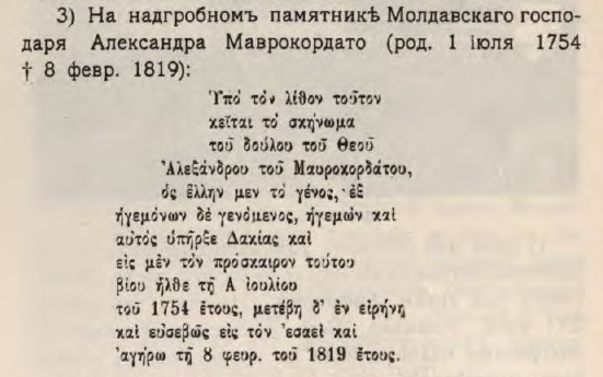 Греческая надпись на надгробной плите Александра II Маврокордато (Данилов монастырь, Москва). Из 410-й страницы книги Православные монастыри Росс.империи 1908 года.